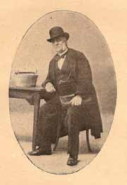 Photo de jean SARRAZIN assis à côté d'un bac d'Olive